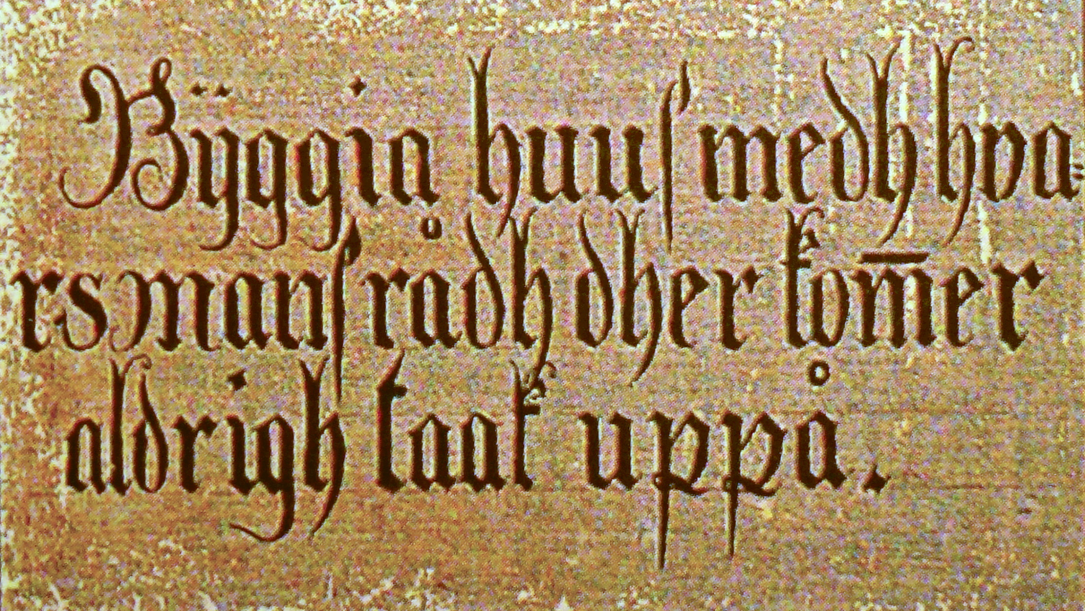 Budskap på bröstningen: Bÿggia huus medh hvars mans rådh dher kommer aldrigh taak uppå. (ungefär: "ett hus byggt med råd från var och en kommer aldrig få ett tak").